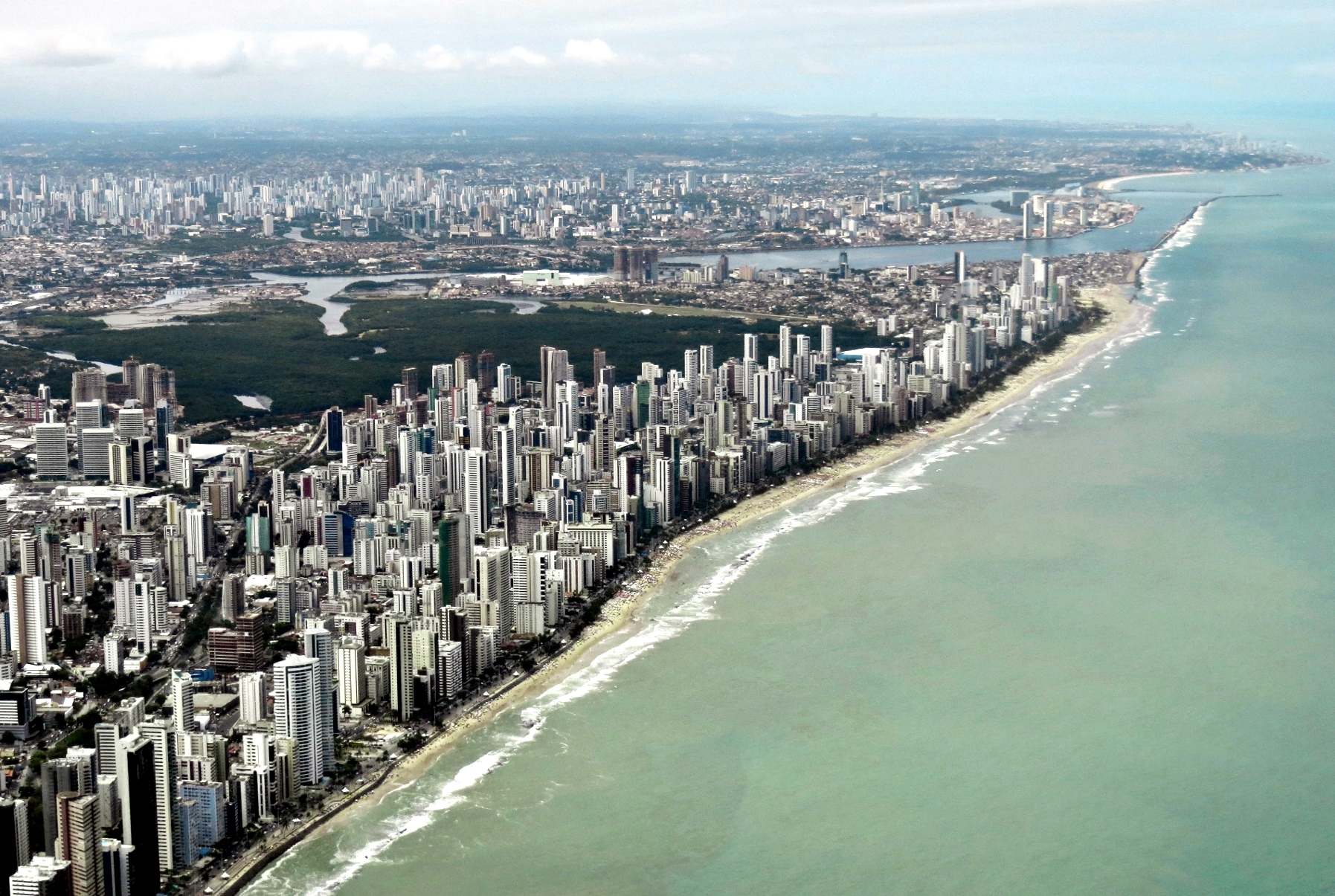 Vista aérea da cidade do Recife, capital de Pernambuco, Brasil.